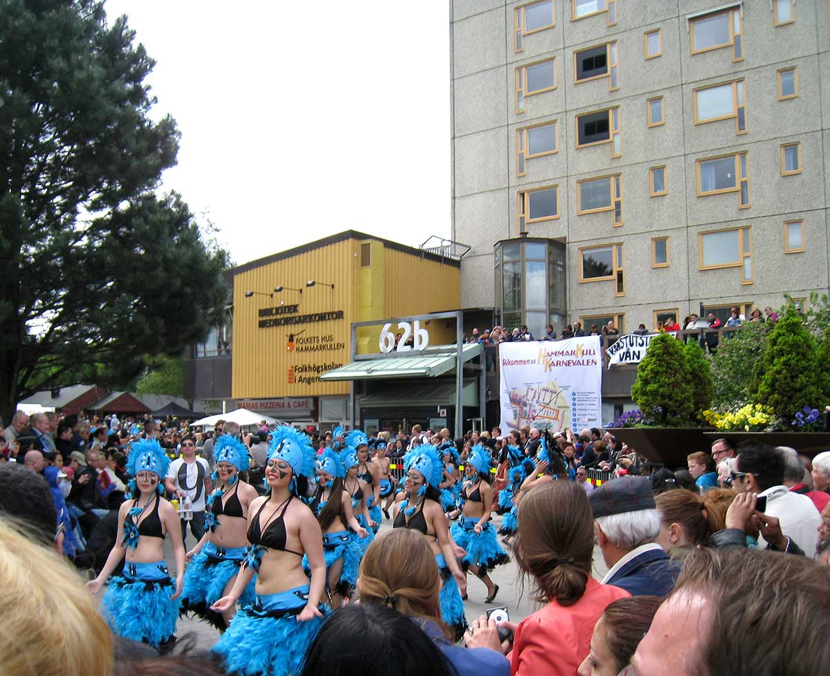 Folkets Hus, Hammarkullen, Göteborg